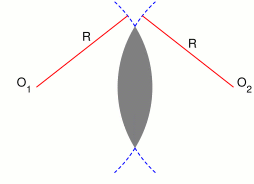 Made by myself.